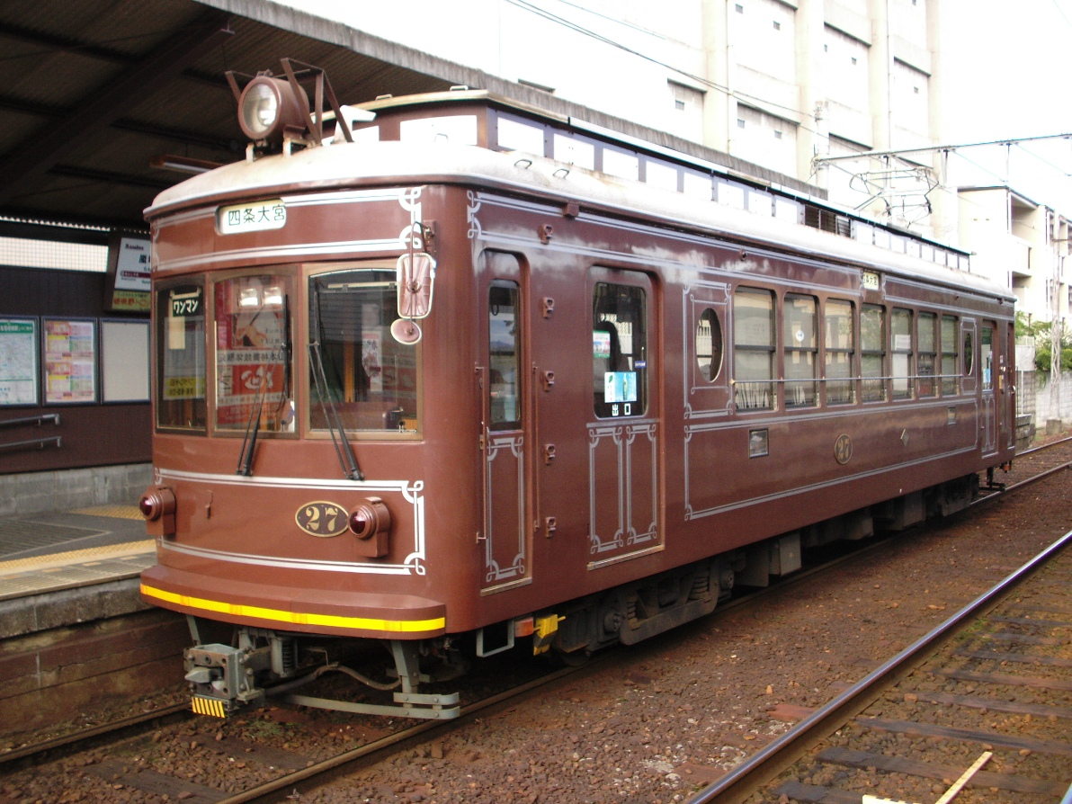 京福電気鉄道モボ21形電車